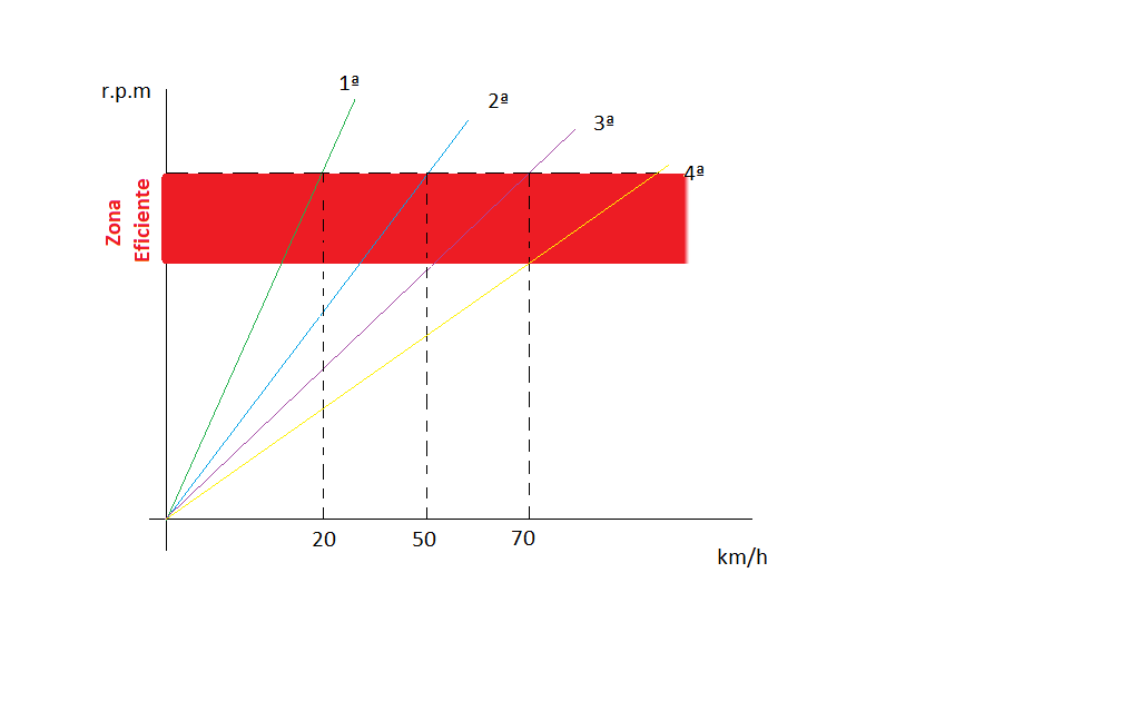 Velocidades y zona eficiente en un motoer de combustion